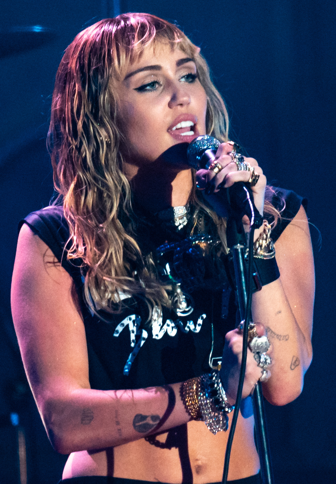 Primavera19_-226